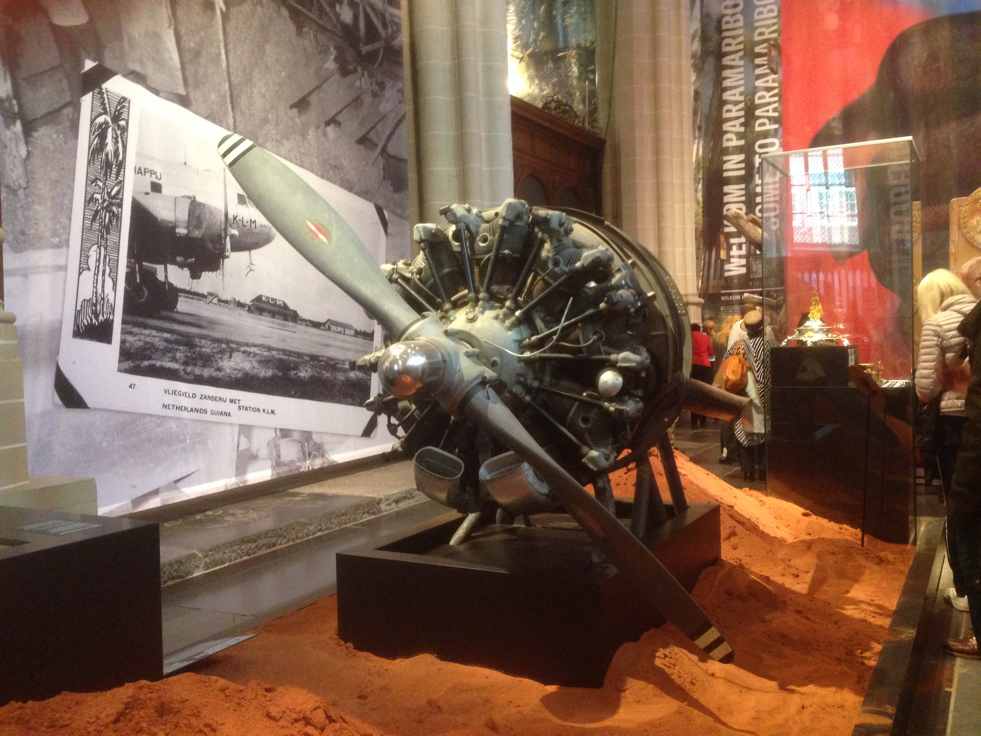 De Grote Suriname Tentoonstelling, De Nieuwe Kerk, Amsterdam